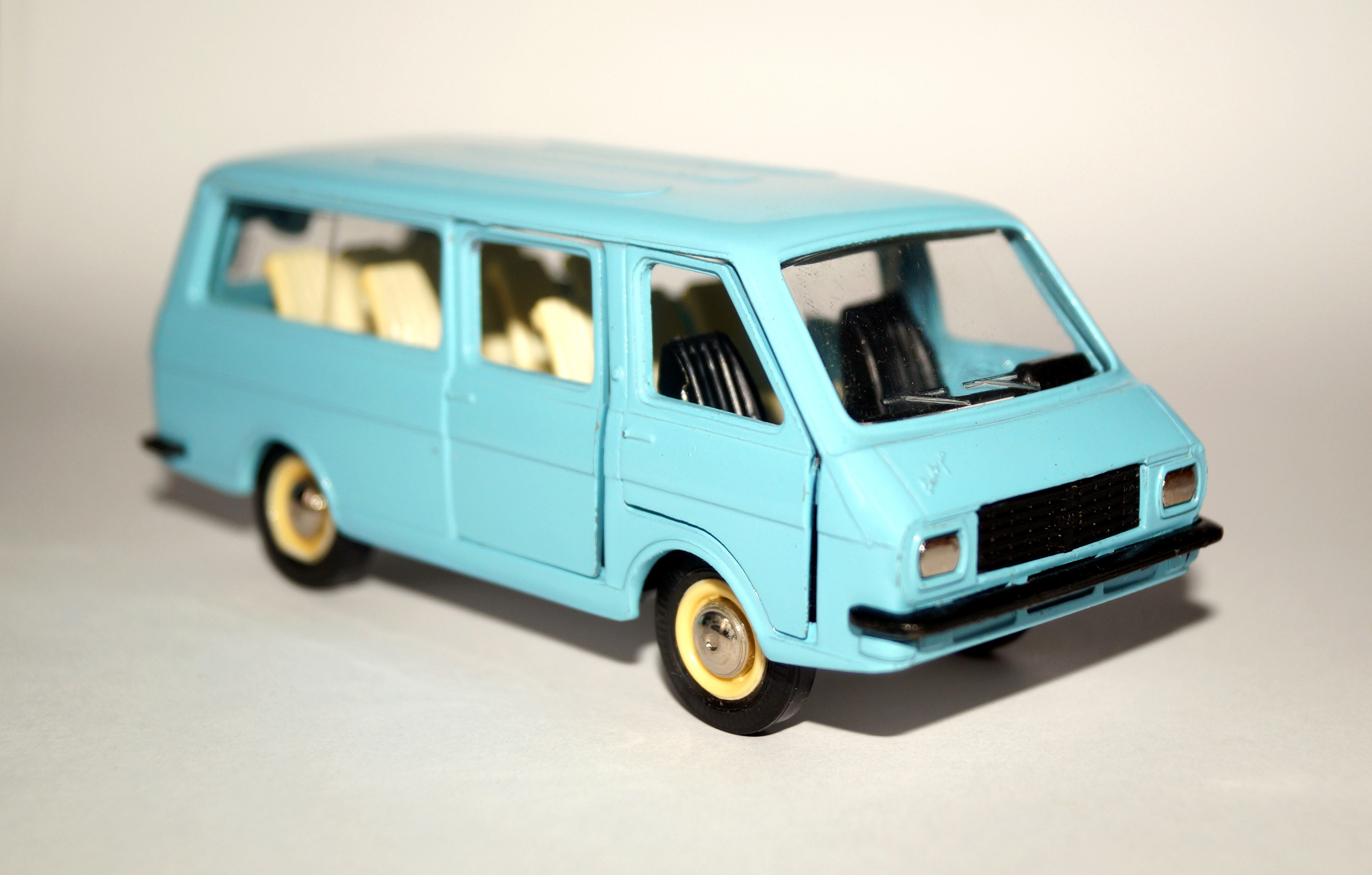 Масштабная модель (1:43) автомобиля РАФ-2203 «Латвия» (№ А18). Выпущена в 1980-е гг.